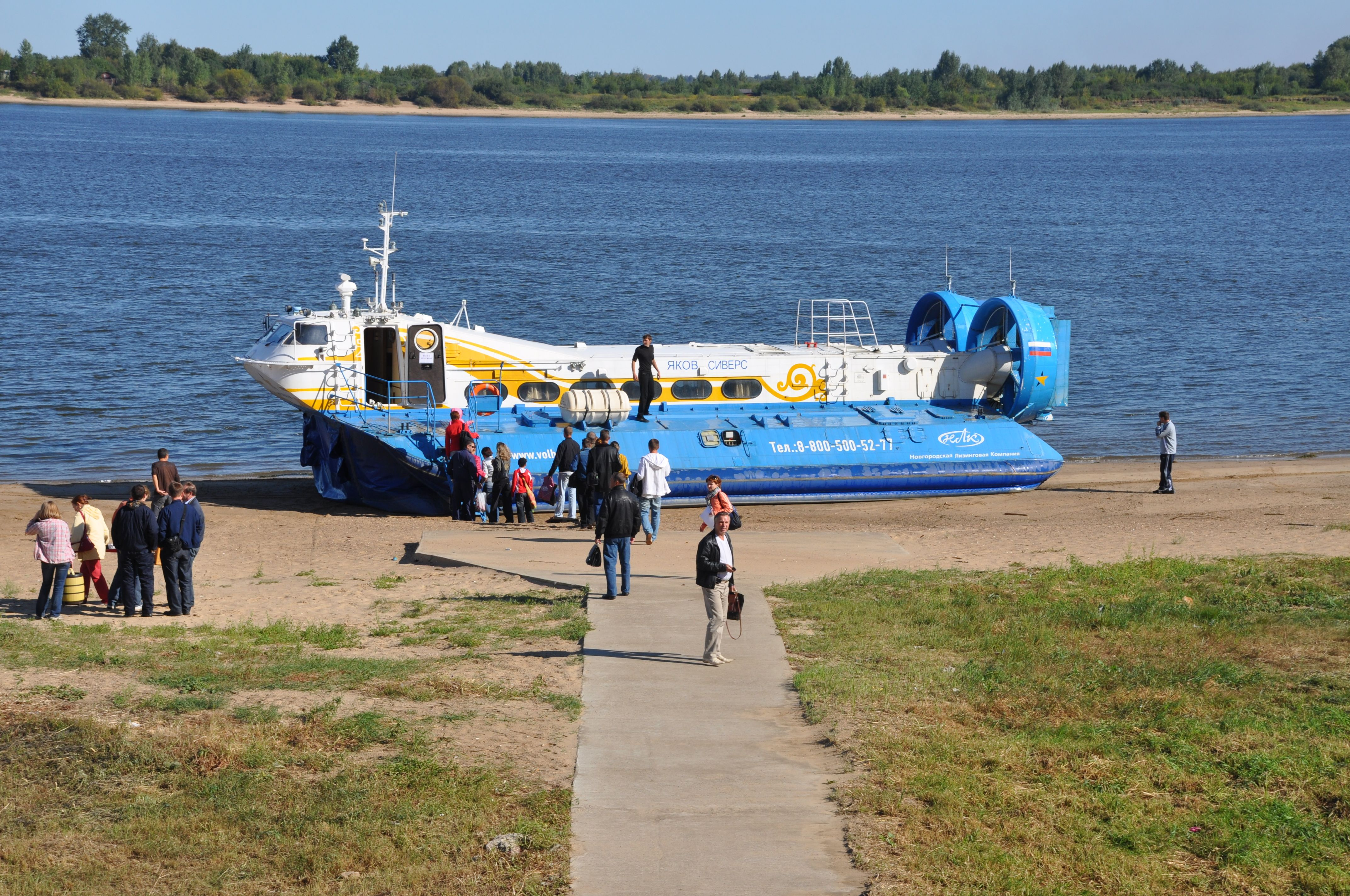 Судно на воздушной подушке Хивус-48 с пассажирами прибыло на нижегородский причал для СВП .Данное СВП работает в качестве пассажирского судна на переправе между городами Нижний Новгород - Бор.